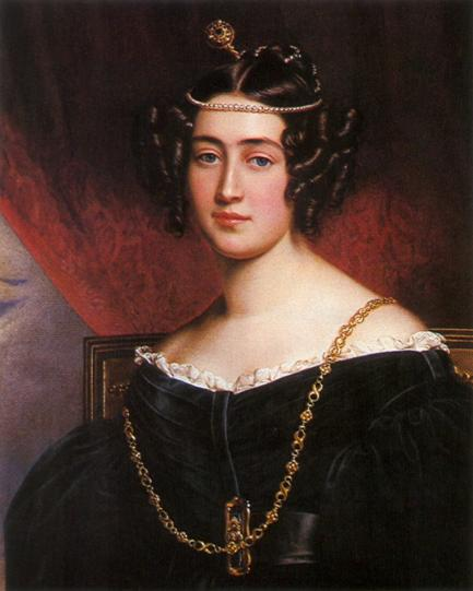 Irene, Graefin von Arco-Steppberg, nee Marchesa Pallavicini (1811-1877)